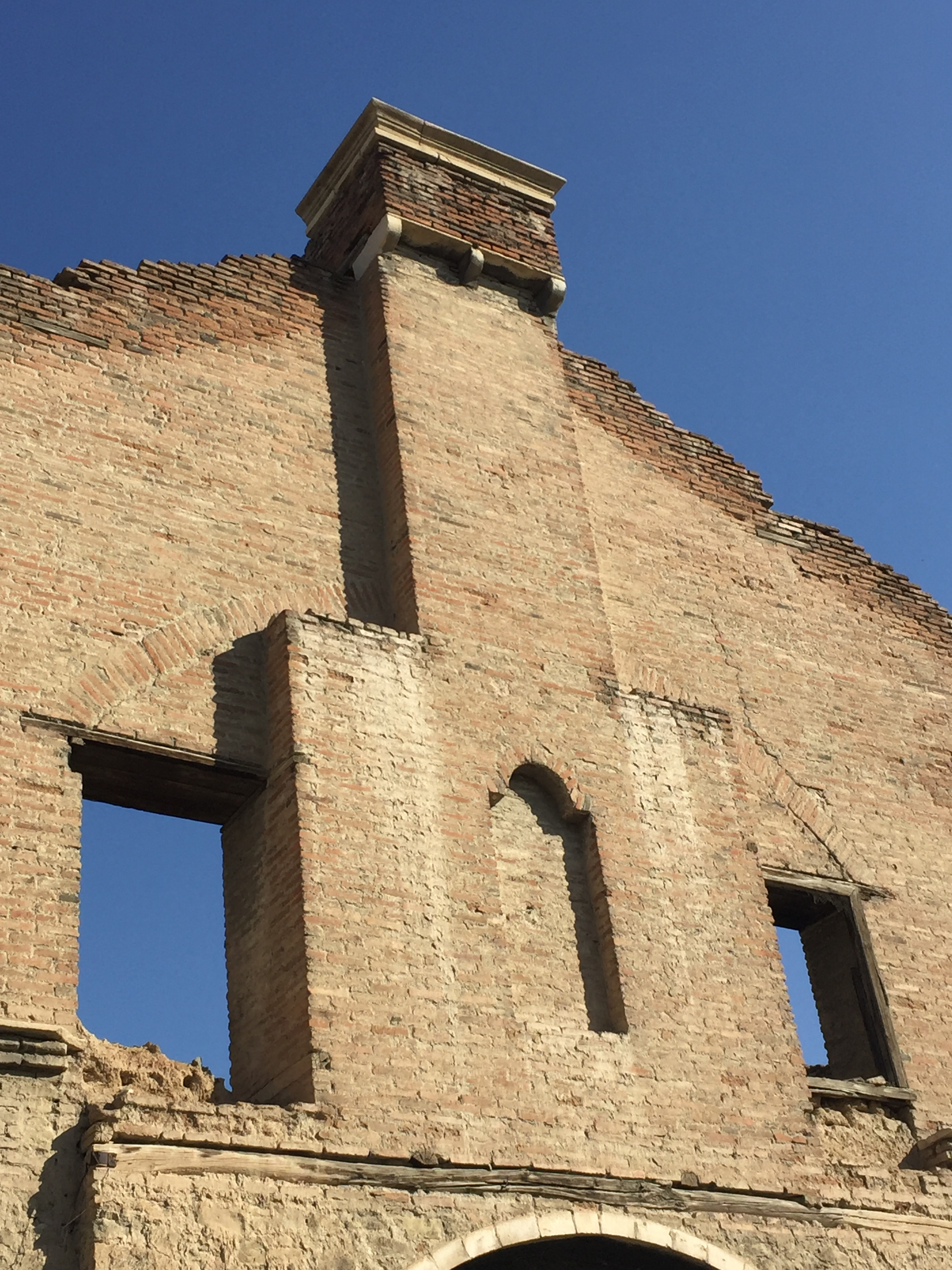 Elazığ Ermeni Protestan Kilisesi